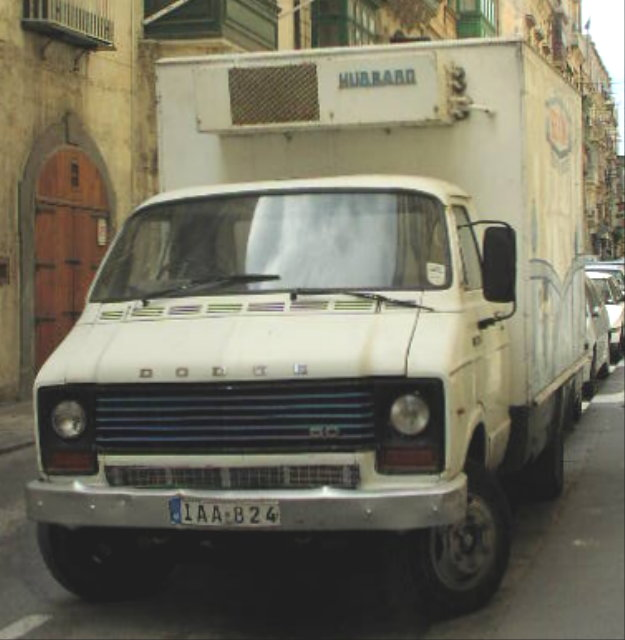 Dodge 50 from "Benna Milk", Malta